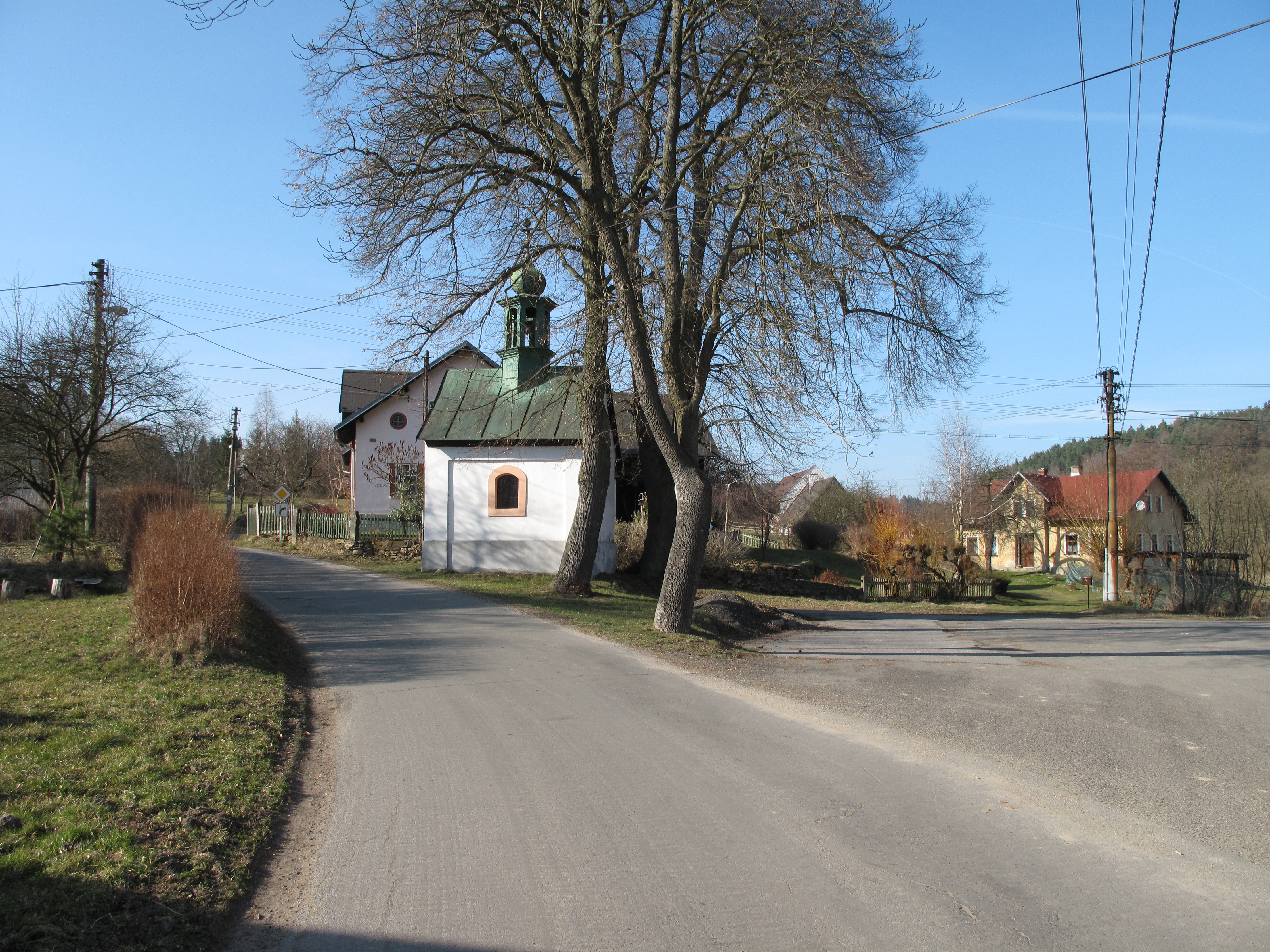 Kaplička ve Všelibicích. Okres Liberec, Česká republika.